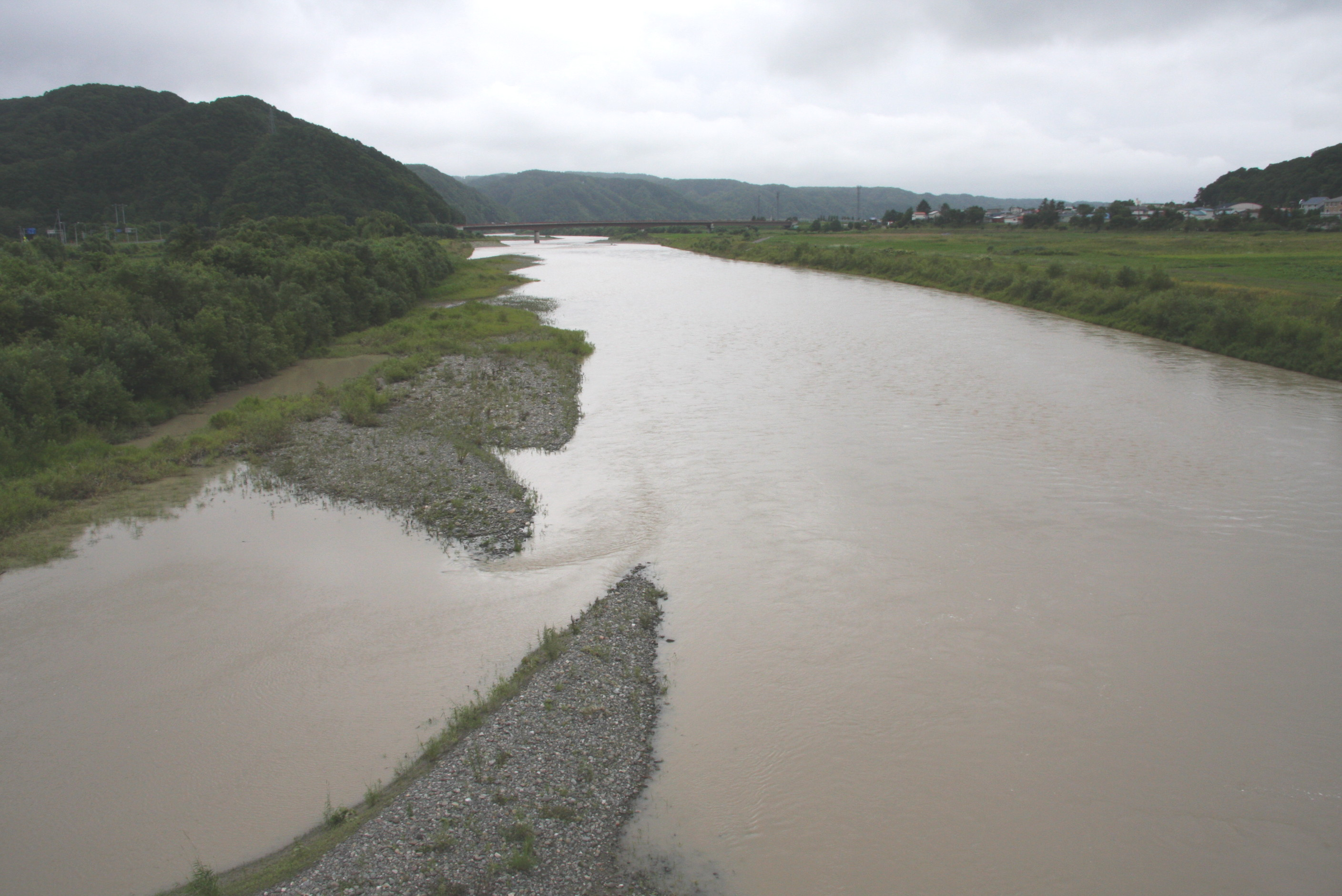 沙流川 平取橋より下流を望む